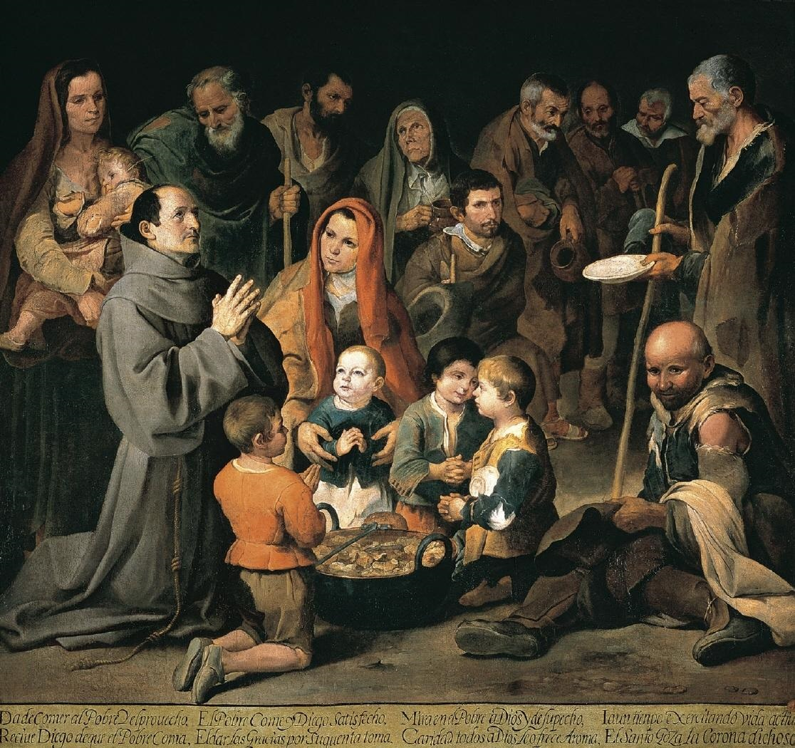 La obra representa al religioso franciscano San Diego de Alcalá repartiendo comida entre los menesterosos, y es uno de los cuatro lienzos del pintor sevillano Bartolomé Esteban Murillo que se conservan en la Real Academia de Bellas Artes de San Fernando, situada en la ciudad de Madrid, (Spain).